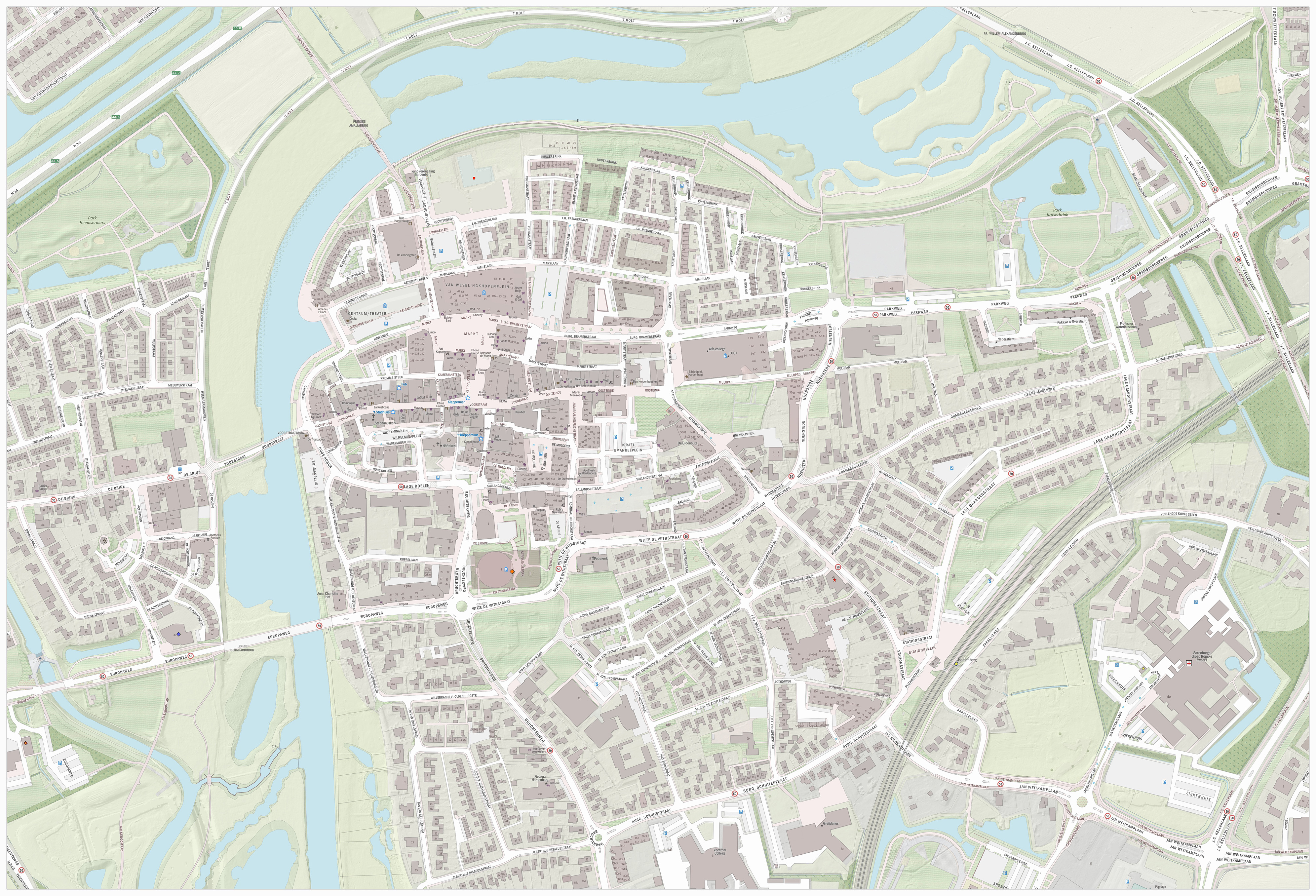 Topografische kaart van Hardenberg (centrum van woonplaats). Resolutie: 2688 pixels/km. Kaartbeeld samengesteld uit de open geodata van de Basisregistratie Grootschalige Topografie (BGT), Creative Commons-BY Kadaster, en Top10NL en Top25namen (Basisregistratie Topografie, Kadaster), Creative Commons-BY Kadaster. Gebouwvlakken uit open geodata BAG extract, Creative Commons-BY Kadaster. Wegen uit de OpenStreetMap, CC-BY OpenStreetMap bijdragers. Reliëfschaduw uit de Actuele Hoogtekaart AHN2/AHN3. Samenstelling en kleurenschema: Jan-Willem van Aalst, met QGIS2. Zie ook de Legenda.